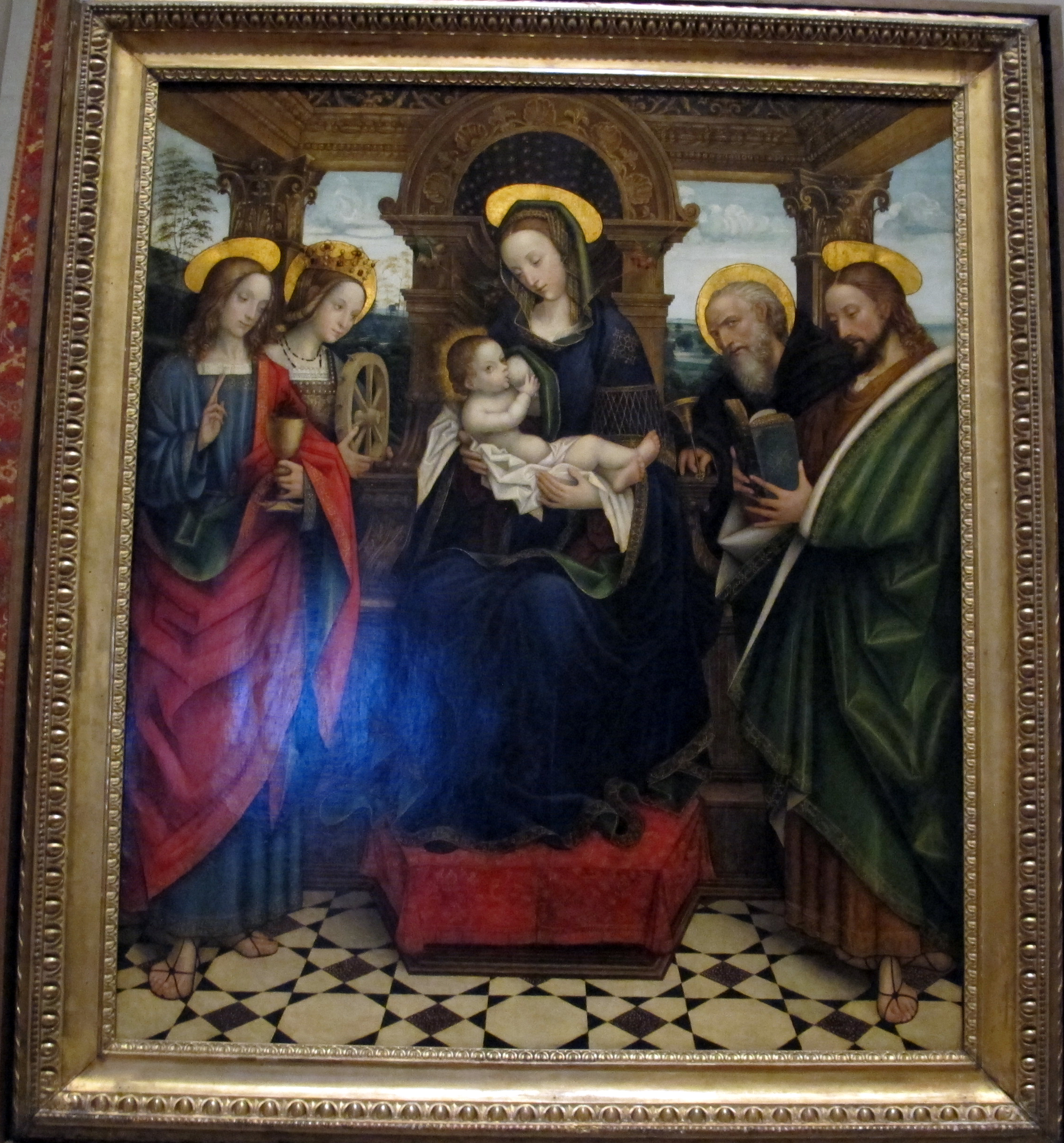 Philadelphia Museum of Art